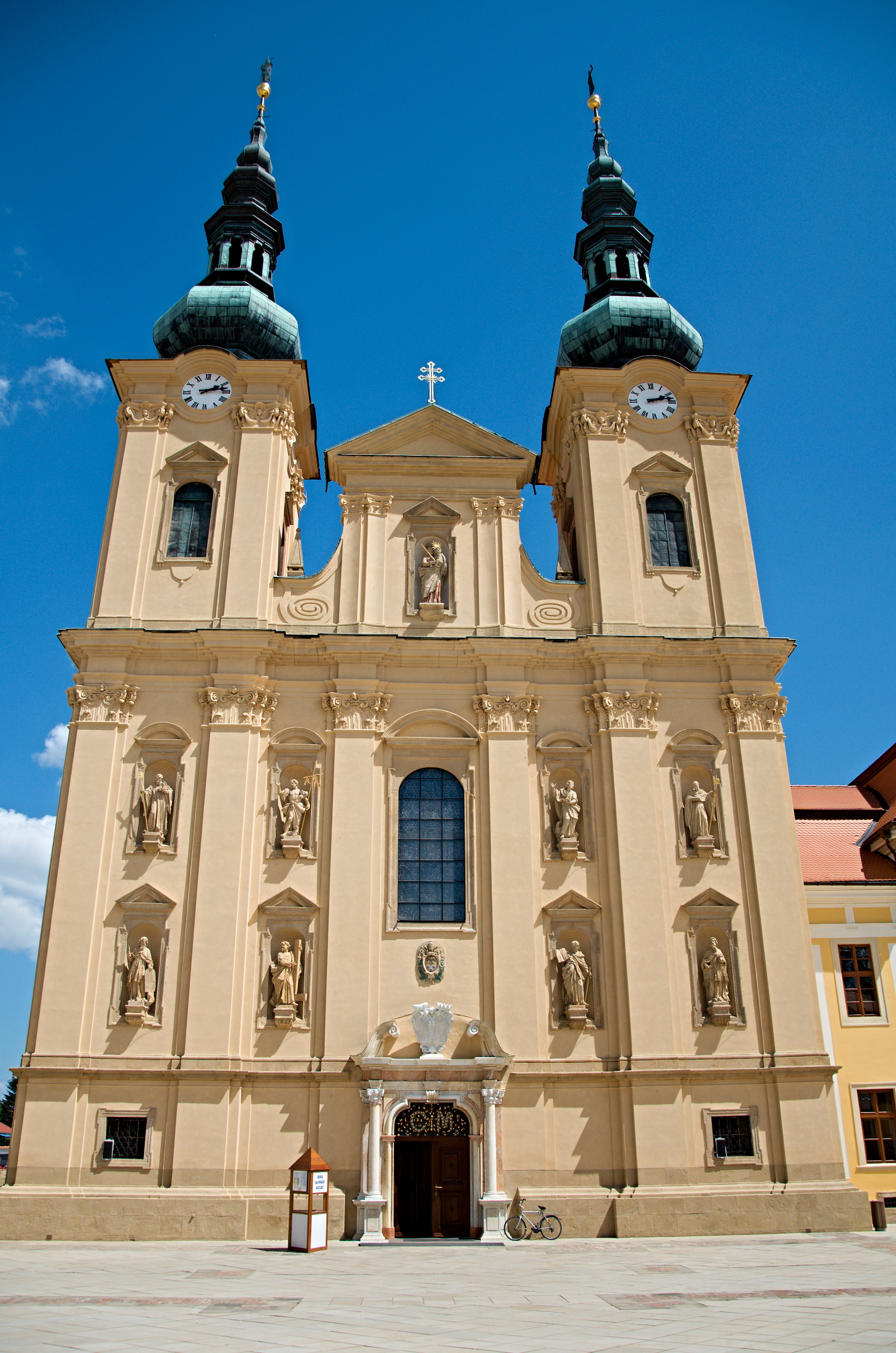 Klášter cisterciáků (Velehrad), Velehrad 1.